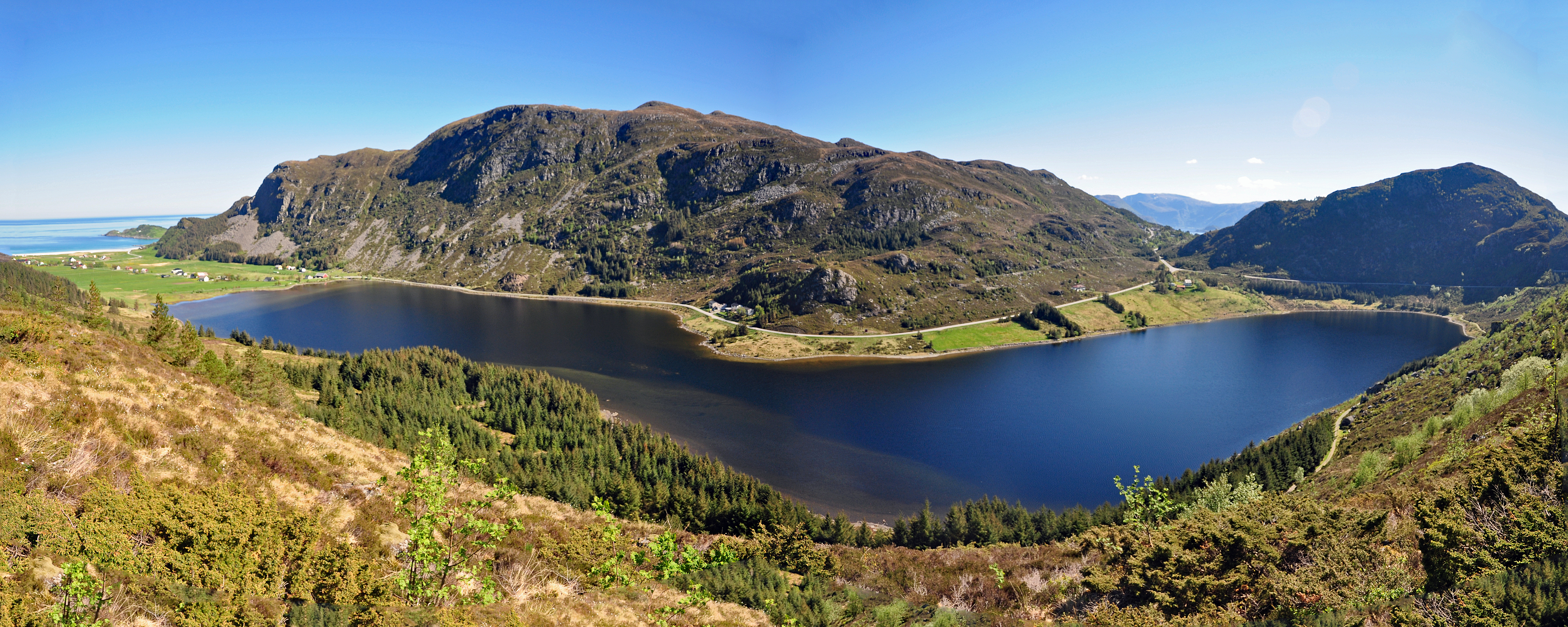 Refvikvatnet er eit naturreservat i Vågsøy kommune. Vatnet, som er ein såkalla strandsjø, ligg like over havnivå og er oppdemt av lausmassar frå havet. Det representerer ein naturtype som er svært sjelden i Sogn og Fjordane, og heller uvanleg i landsmålestokk. Vatnet, som er relativt næringsfattig, har saman med dei tilstøytande områda stor verdi som trekk- og overvintringsplass for andefugl og vadefugl. I alt er 44 artar våtmarksfugl påviste her. (Kjelde